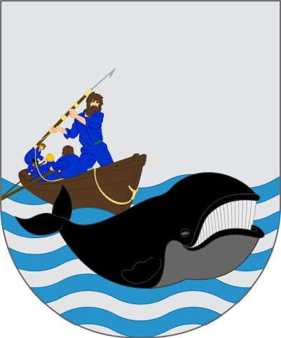 Mutriku herriko armarriaren bertsio libre bat